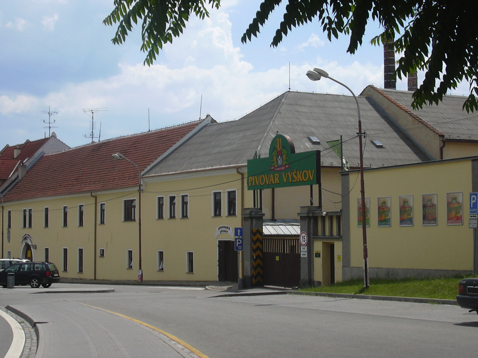 Pivovar (Vyškov- czech republic)